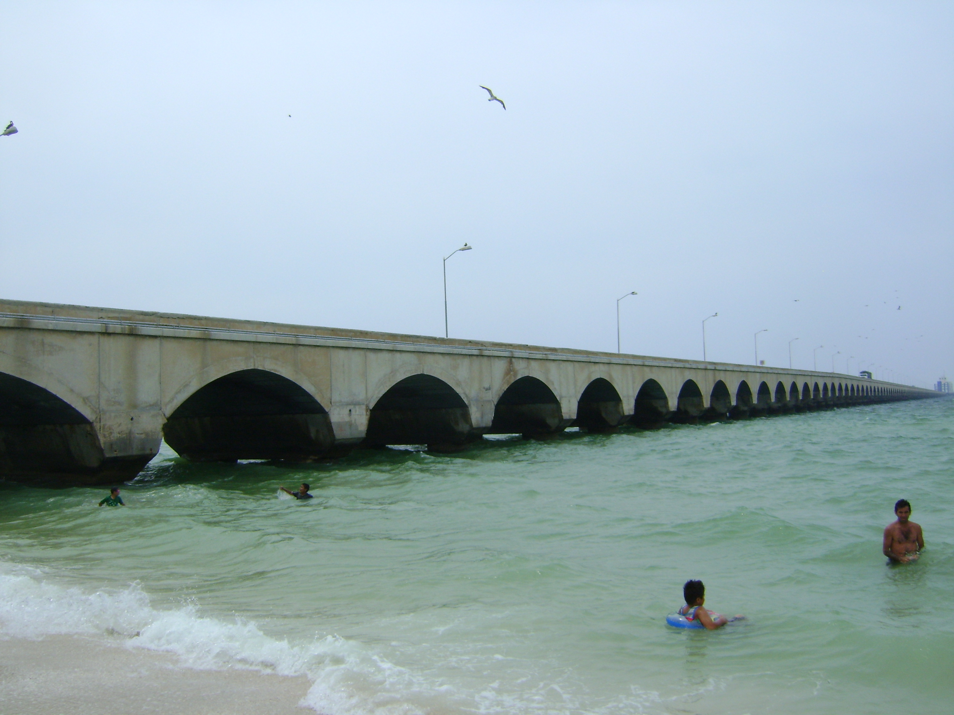 Sus peculiares arcos